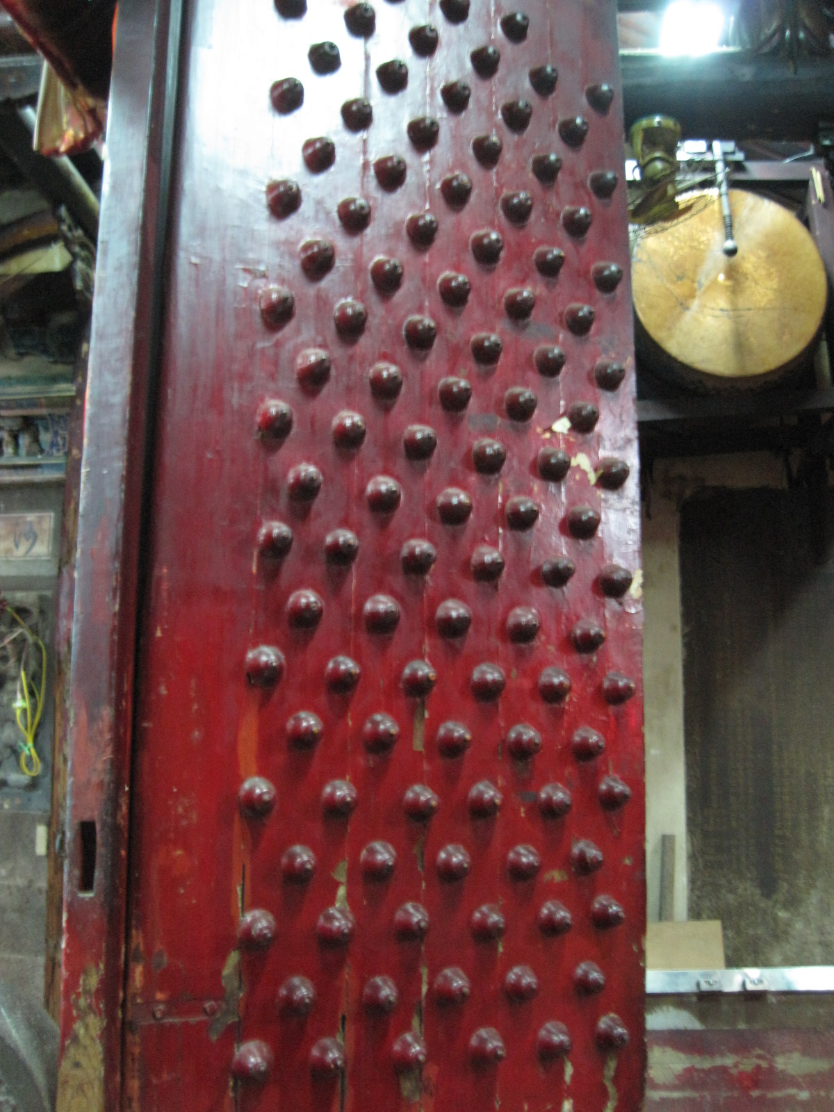 臺南水仙宮門